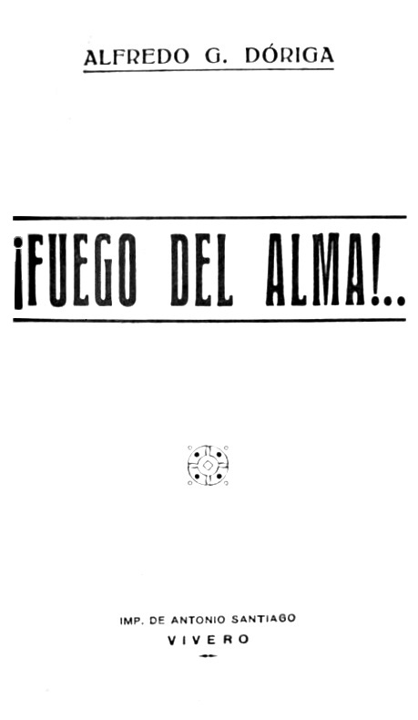 ¡Fuego del alma!